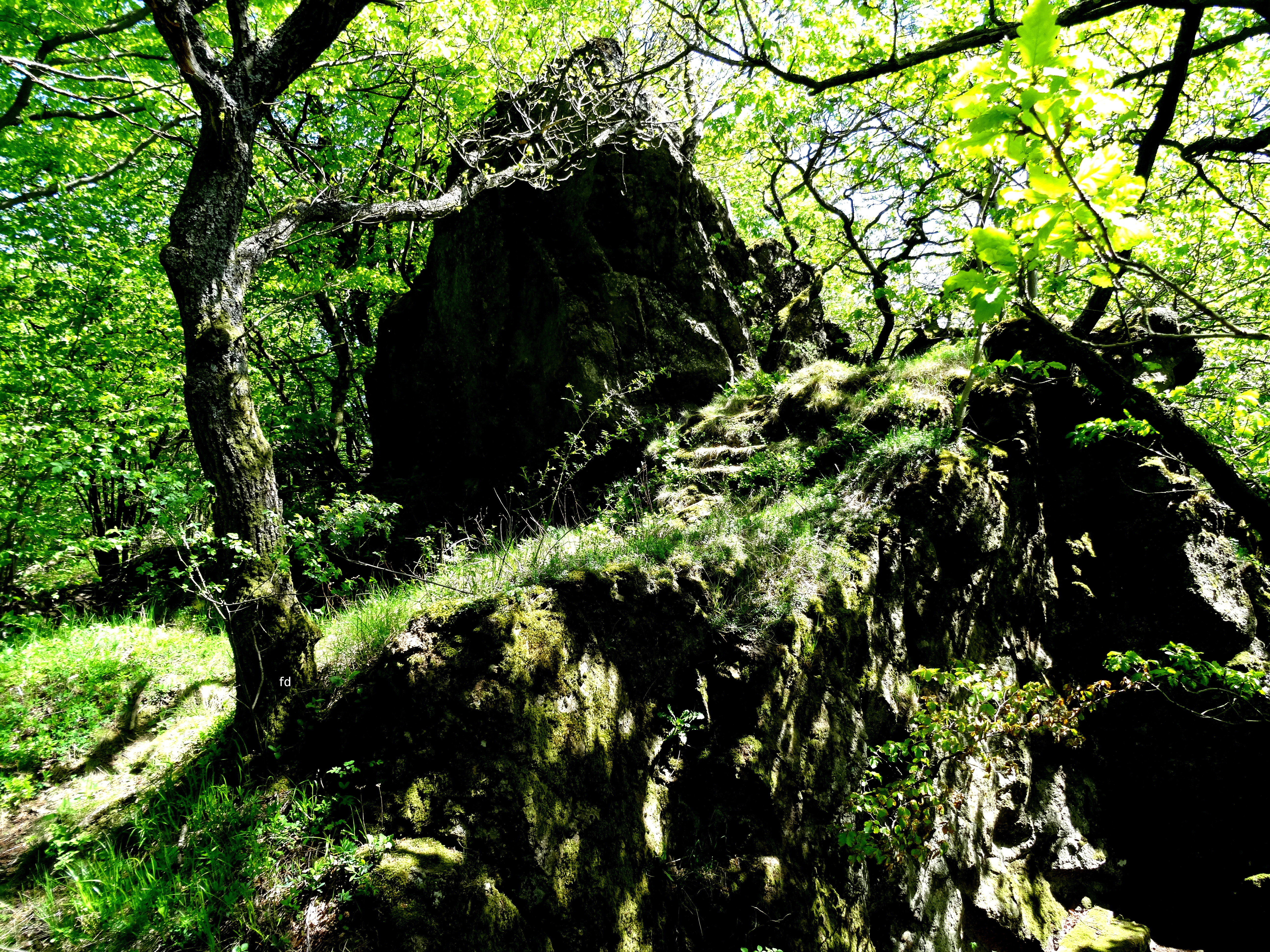 Der Wallenstein westlich von Meschede-Wallen; Naturschutzgebiet „Wallenstein“ (NSG HSK-107) in Meschede.